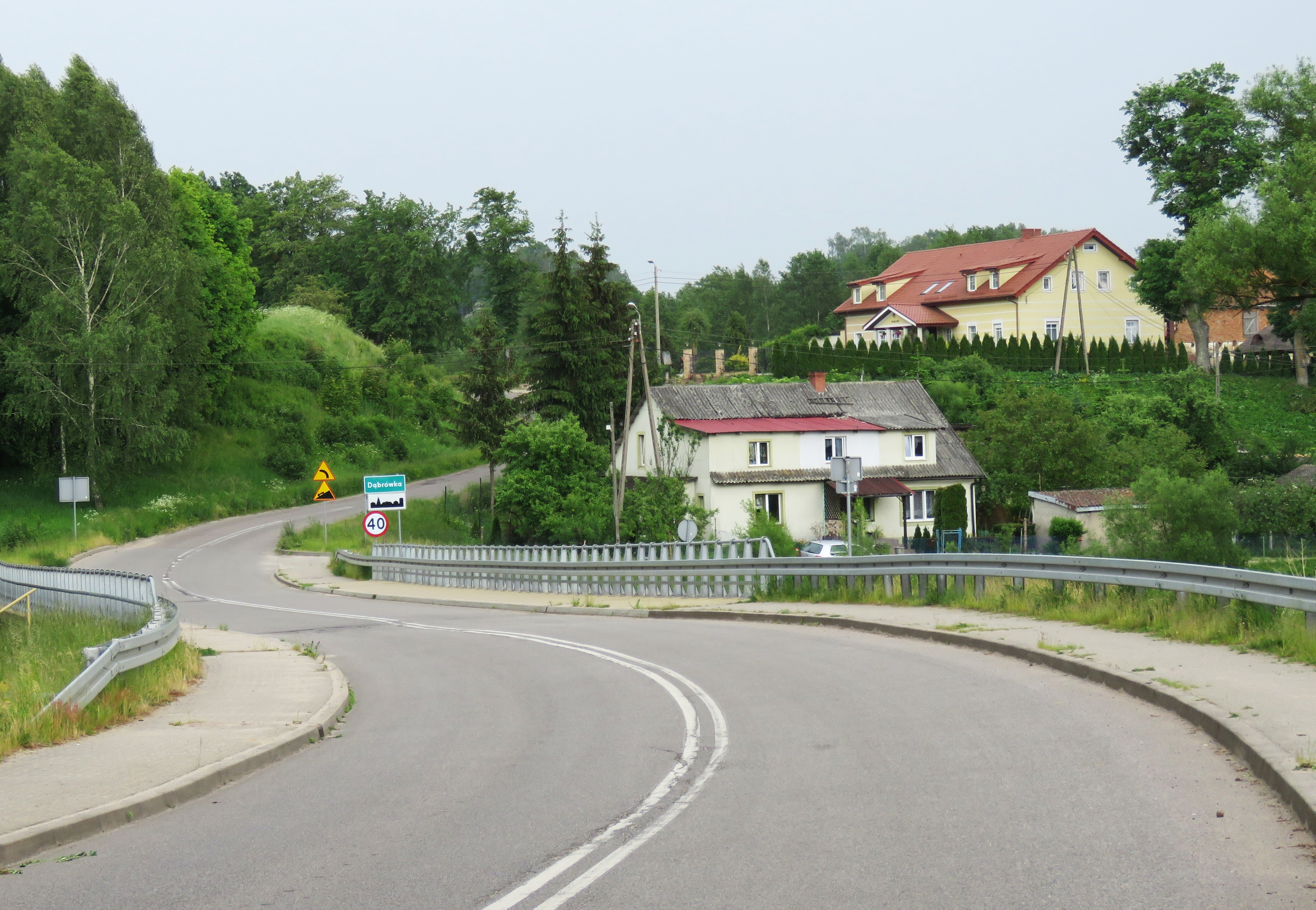 Dąbrówka, gmina Światki